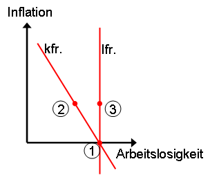 um Erwartungen modifizierte Phillips-Kurve